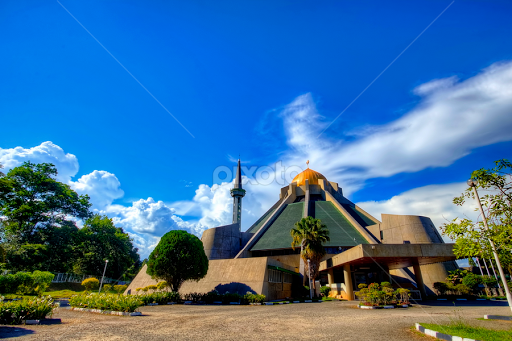 Masjid Daerah Keningau (masjid Daerah Al-Amin)